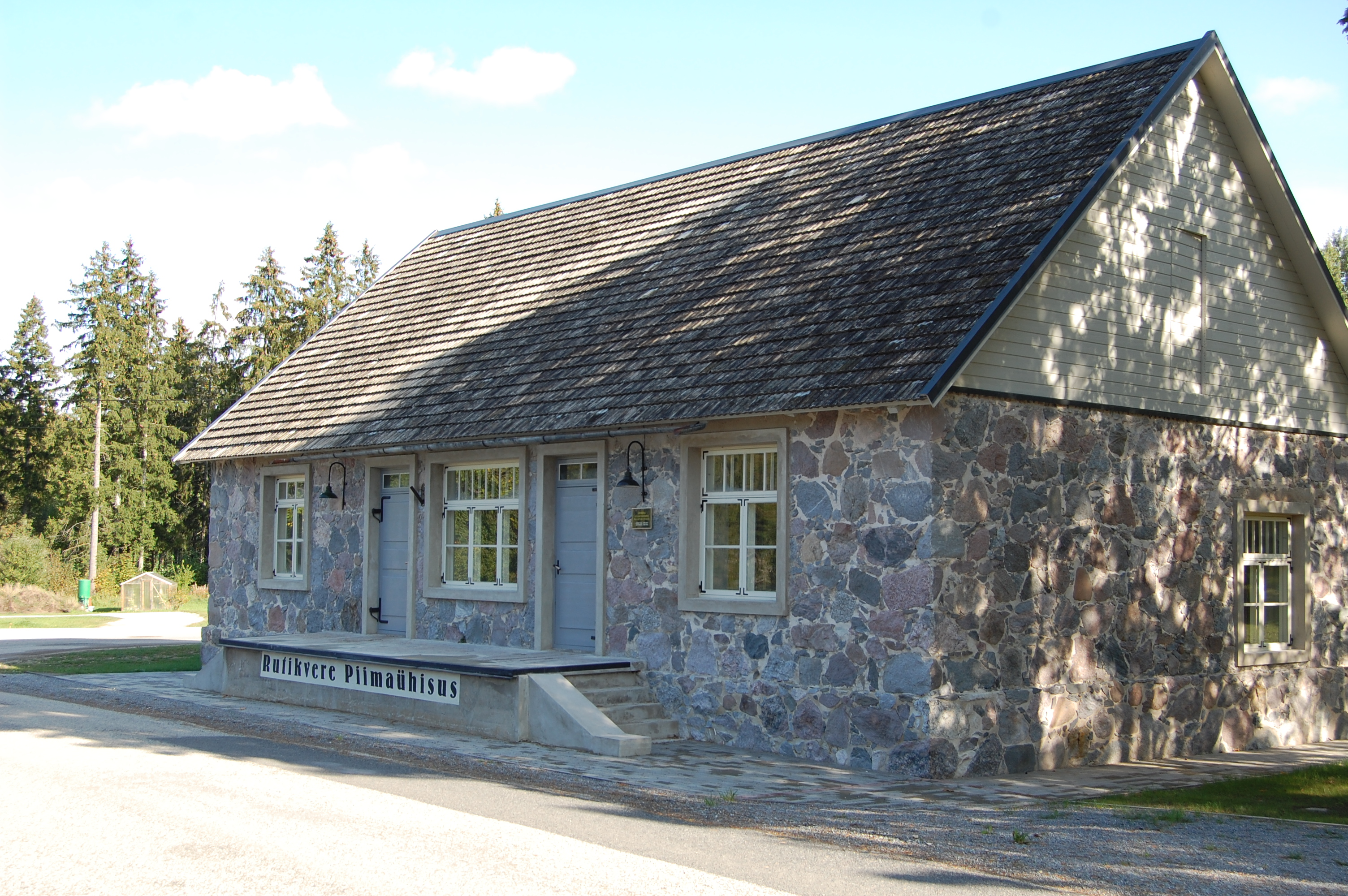 Rutikvere meierei hoone Arisvere külas Põltsamaa vallas 2019. aasta septembris